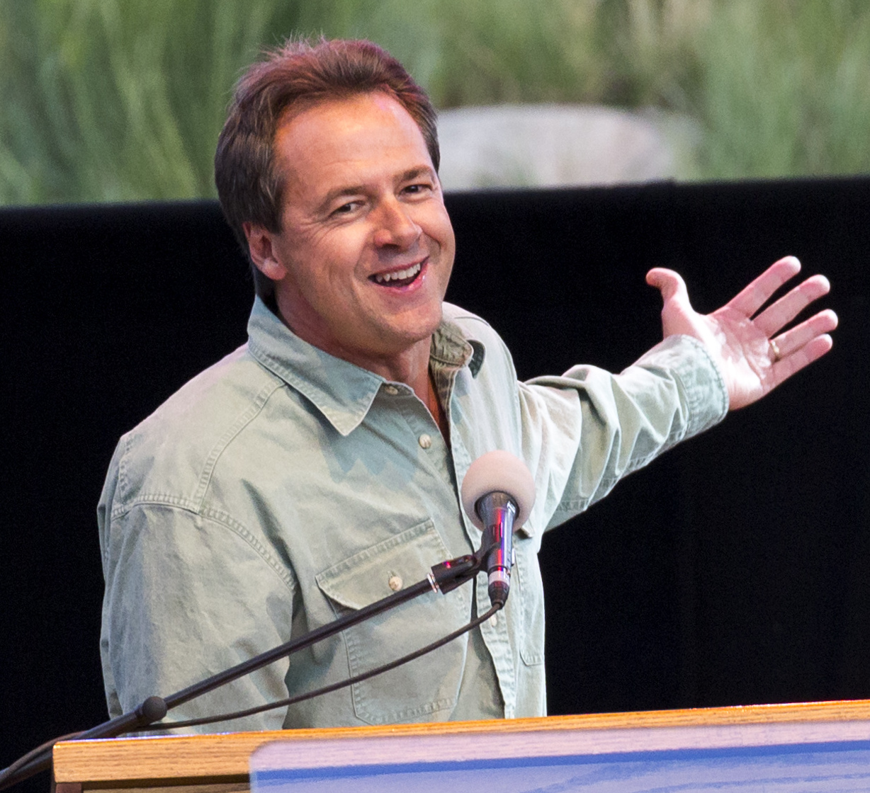 YPF/Matt Ludin